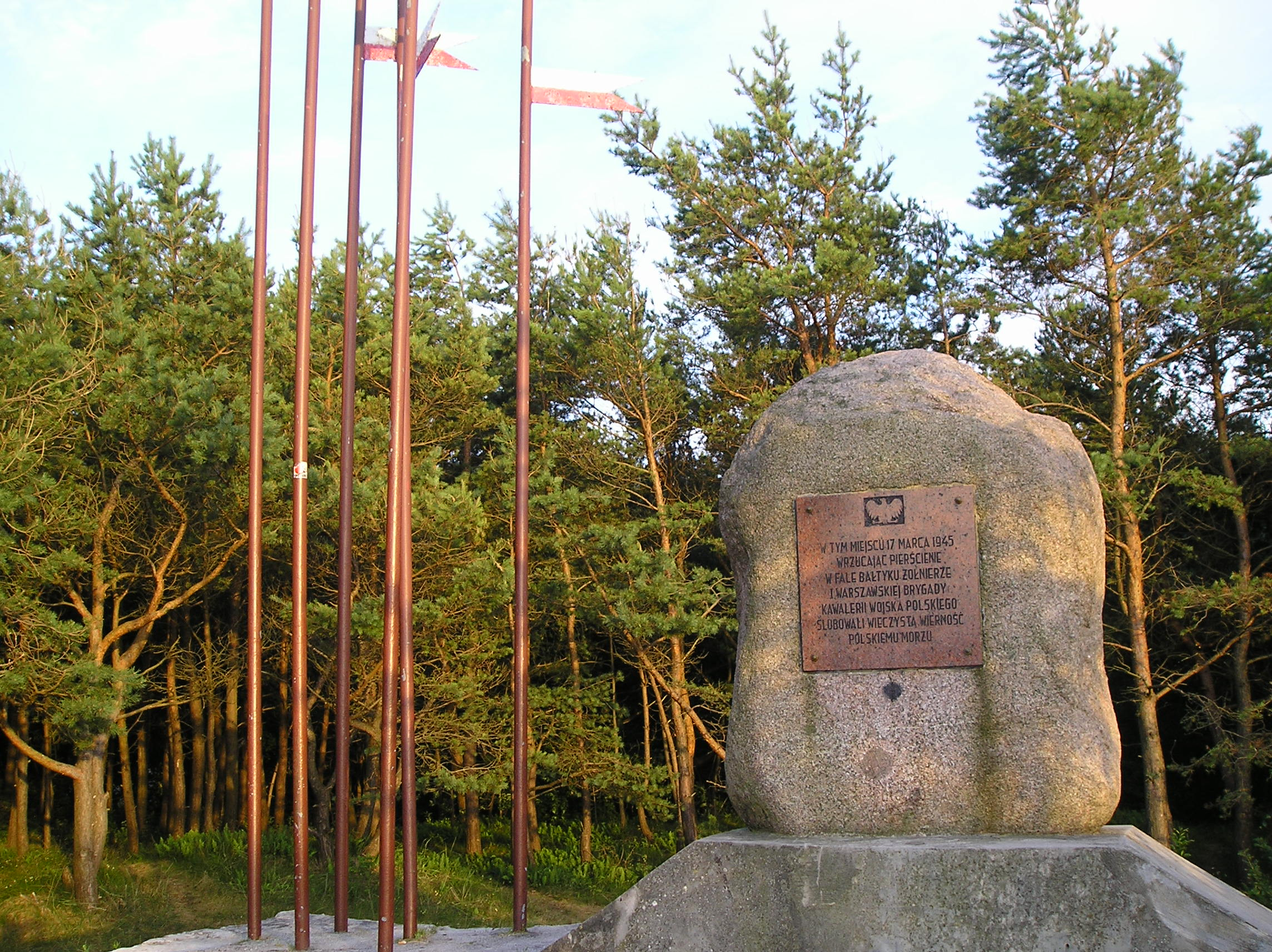 Pomnik zaślubin z morzem w Mrzeżynie